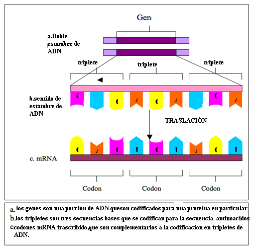 diagrama de transcripcion